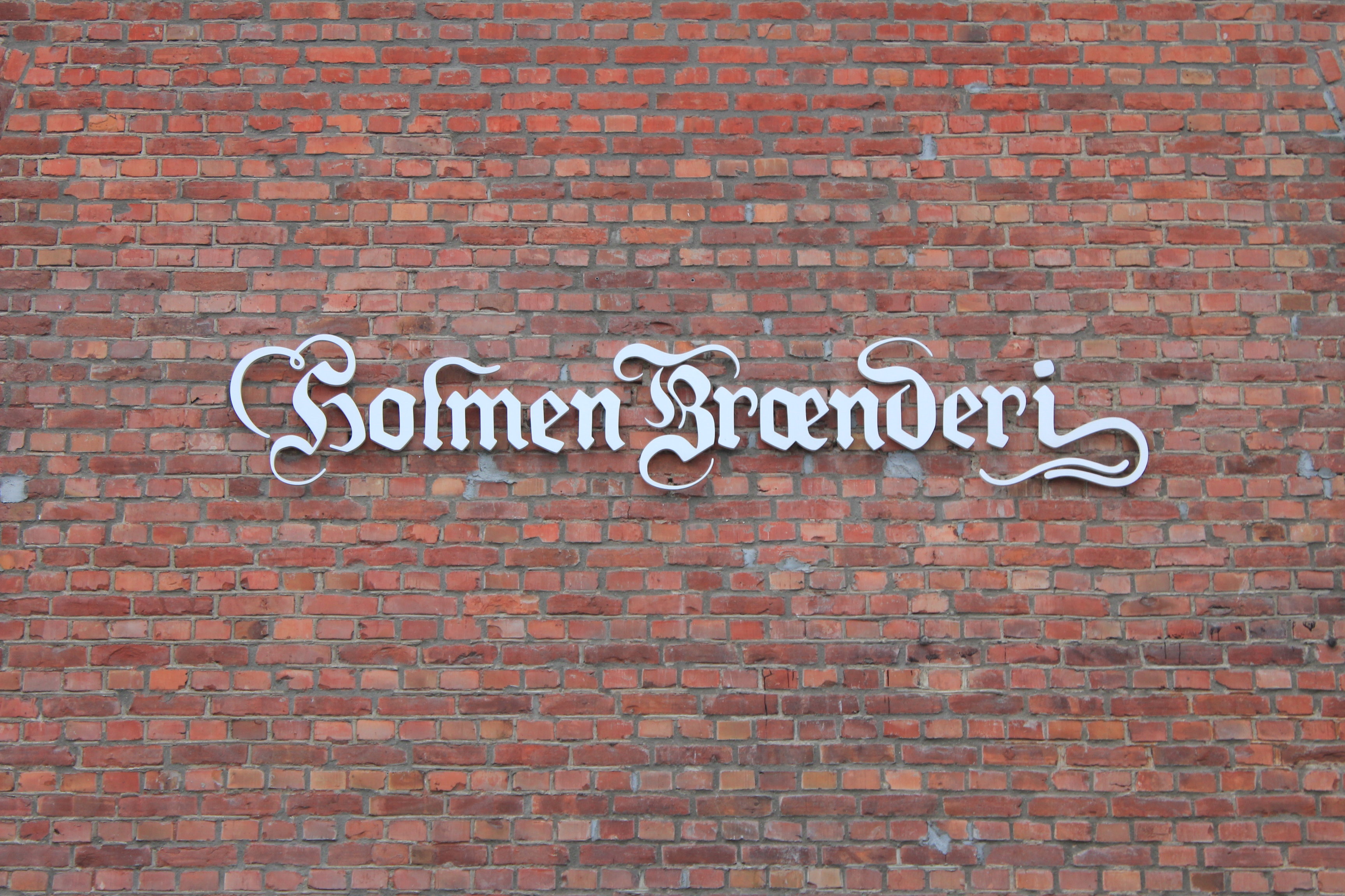 I dag ligger Vitensenteret og Gjøvik Glassverk i lokalene til tidligere Holmen Brænderi på Gjøvik.